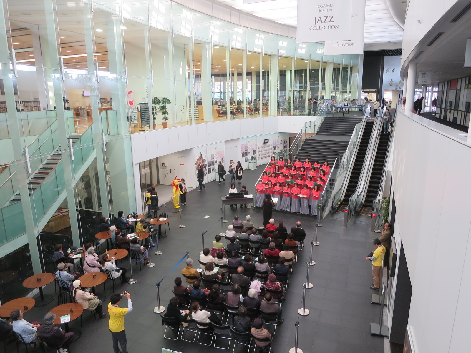 岡崎市図書館交流プラザ りぶら